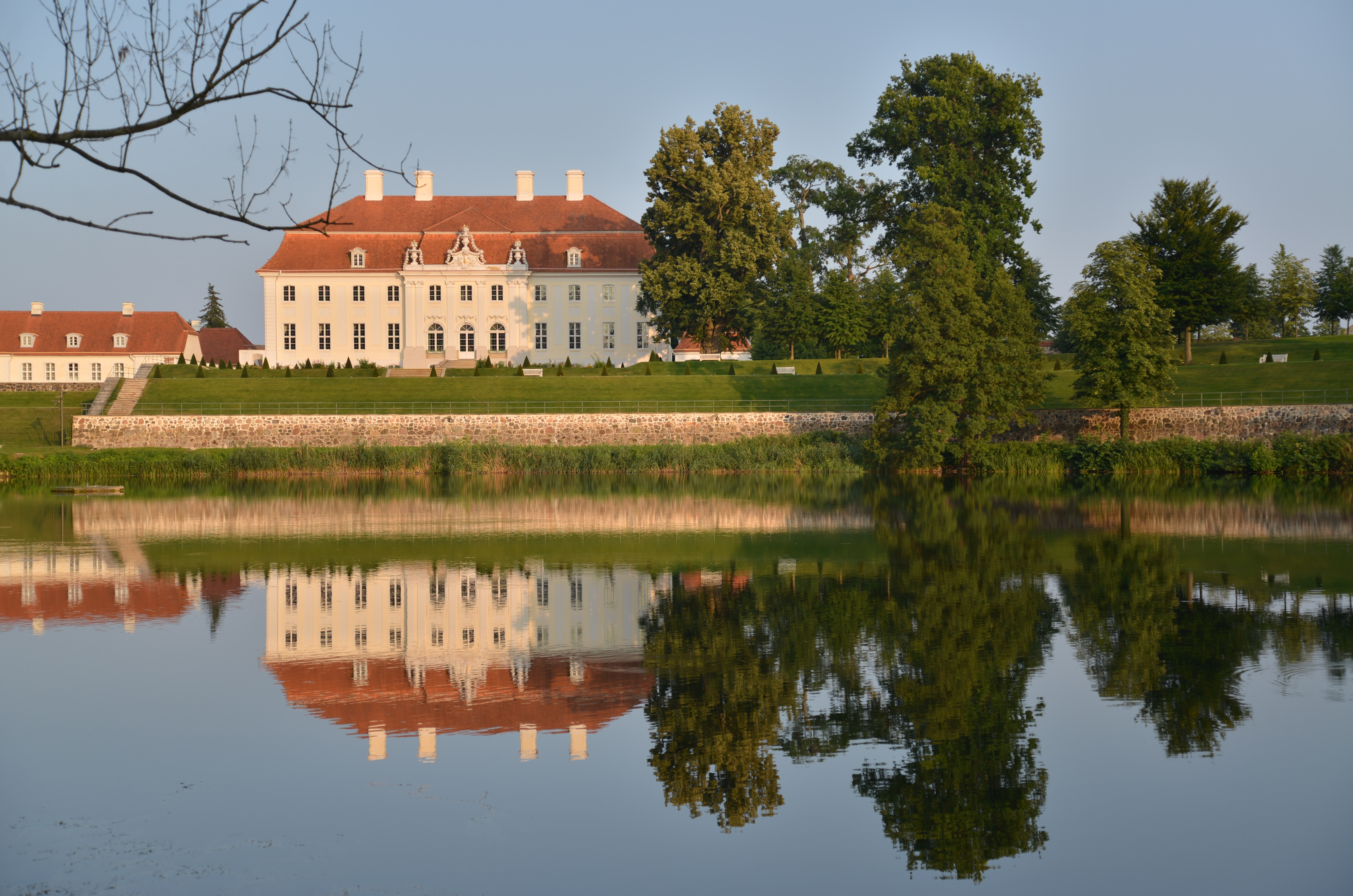 Das Barockschloss Schloss Meseberg in Brandenburg ist das Gästehaus der deutschen Bundesregierung. Es liegt 70 Kilometer nördlich von Berlin in Meseberg, einem Ortsteil der Stadt Gransee mit 150 Einwohnern. Das Gelände liegt unmittelbar südöstlich des Huwenowsees.